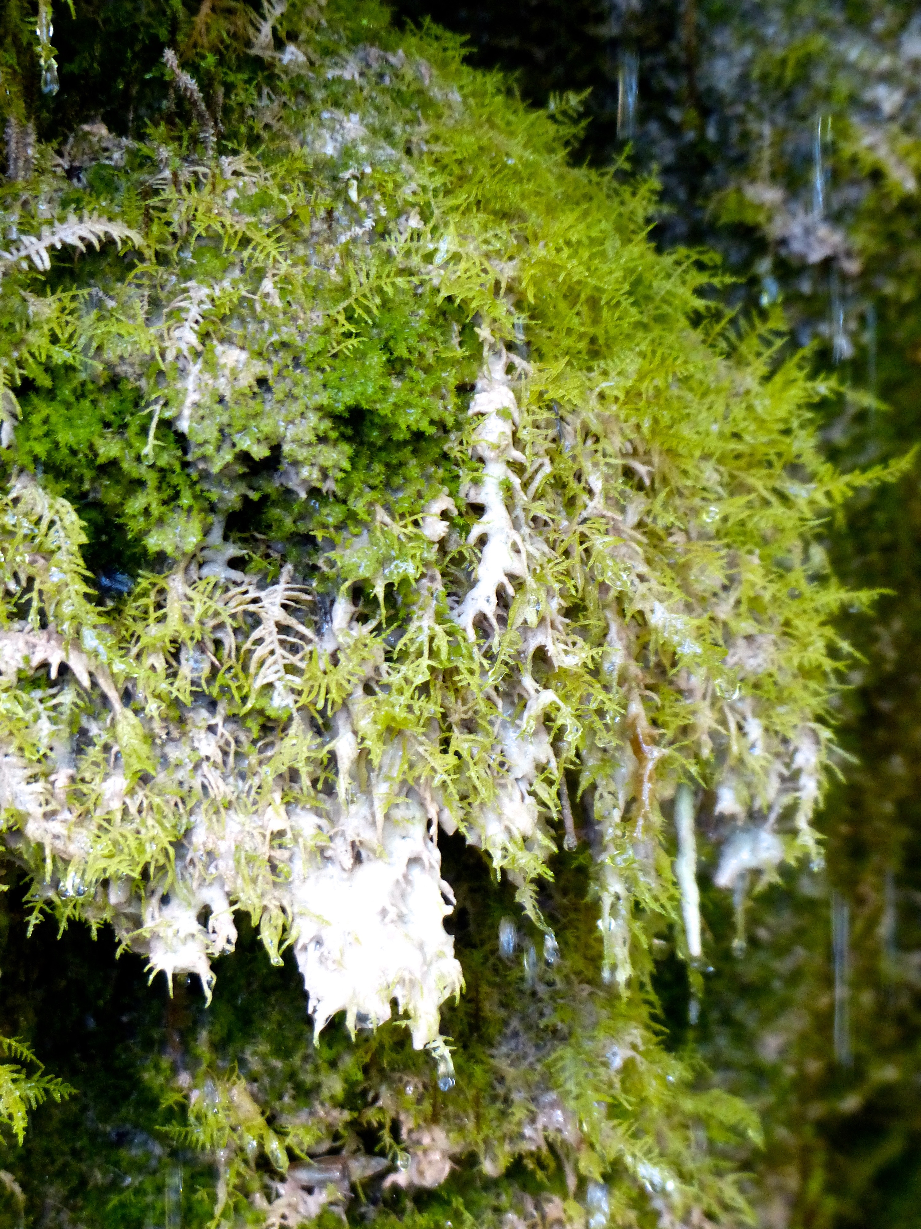 Geotop Wasserfall Hinang: eiszeitliche Terrassenkante am Hinanger Wasserfall: Kalktuffbildungen